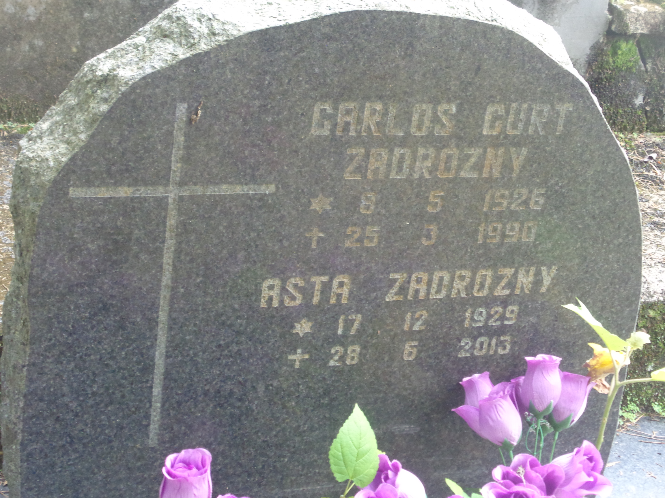 Sepultura de Carlos Curt Zadrosny no Cemitério Evangélico Blumenau Centro